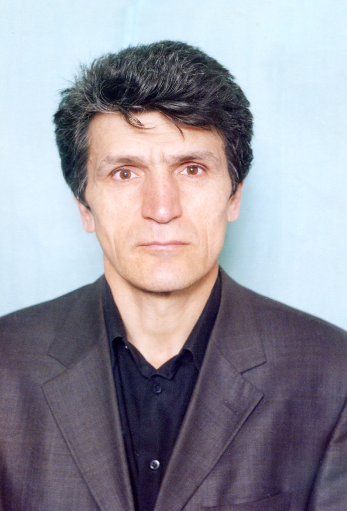 работа в ДГПУ